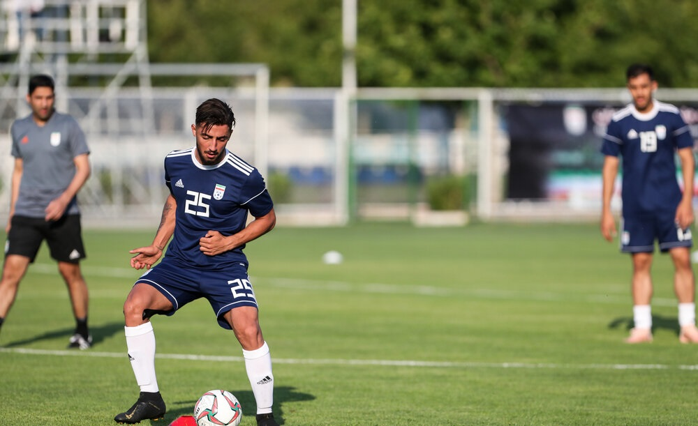 اللهیار صیادمنش در نخستین جلسه تمرینی‌اش با تیم ملی فوتبال ایران